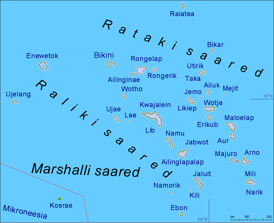 Marshalli saared